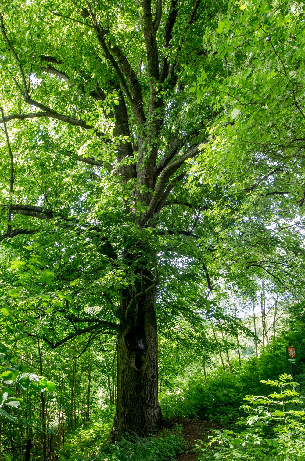 památný strom - Lípa za kynžvartským kostelem, Lázně Kynžvart, okres Cheb